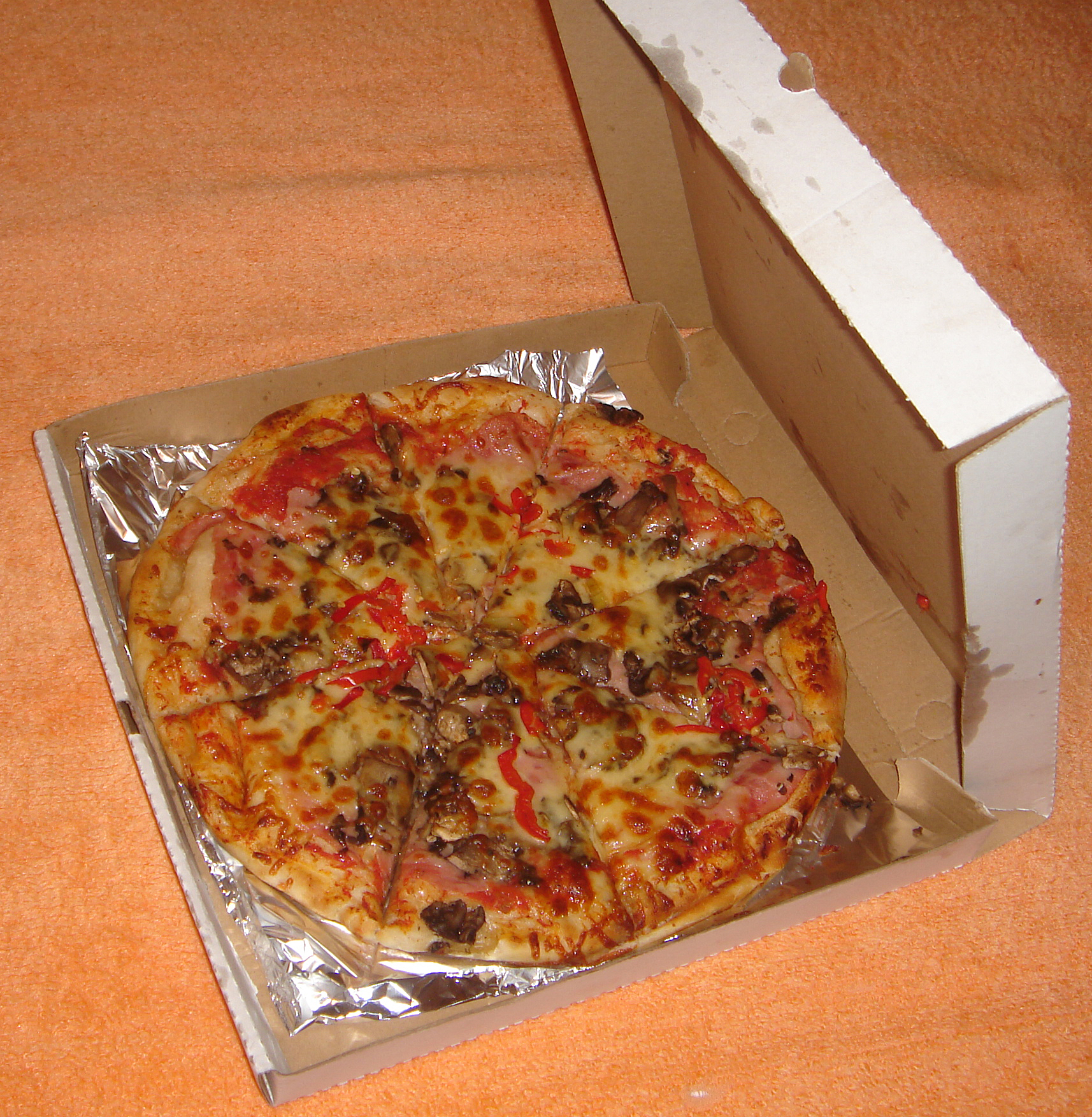 Pizza Toscana in box